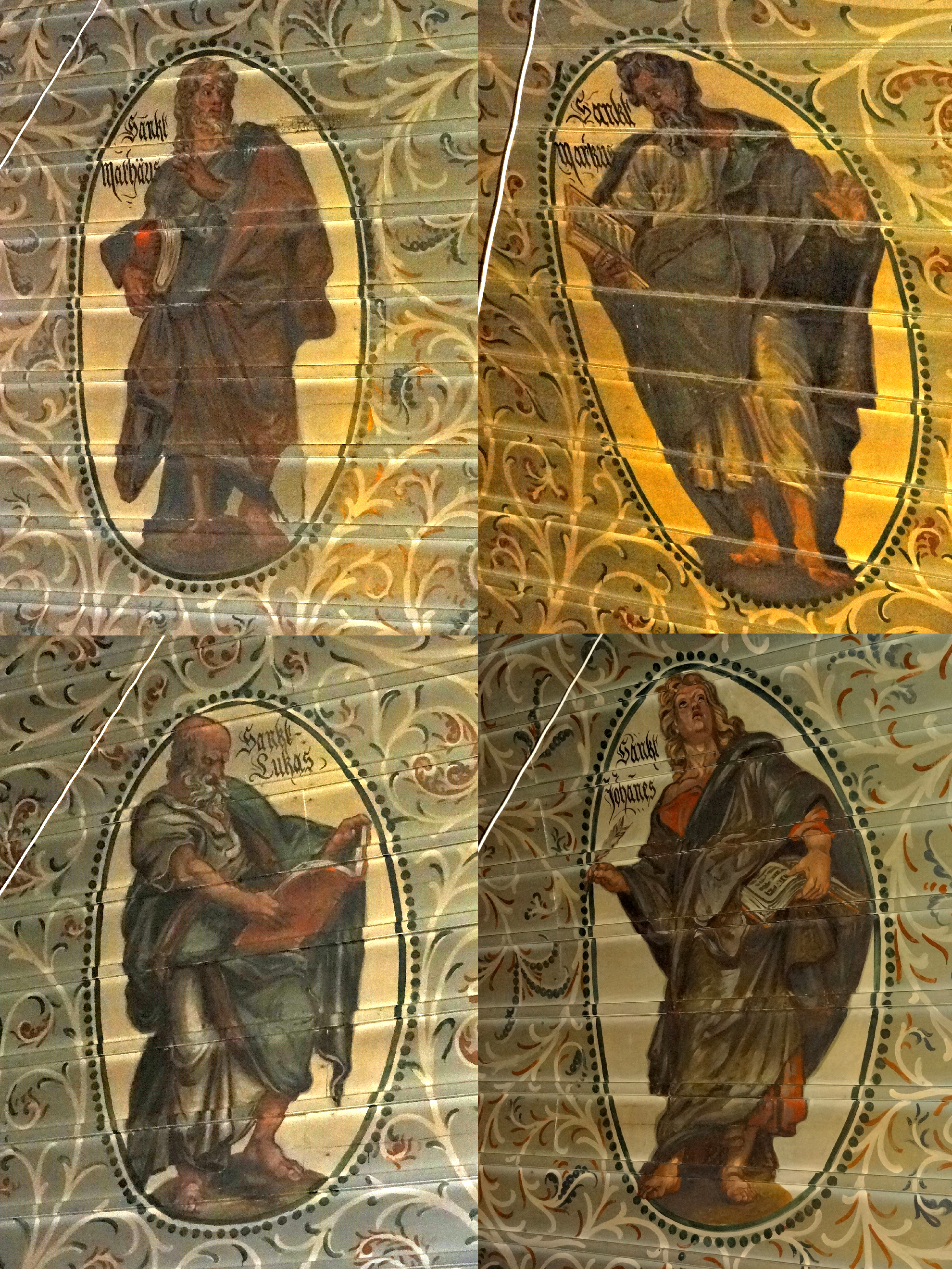 Evangelische Pfarrkirche (Griedel)